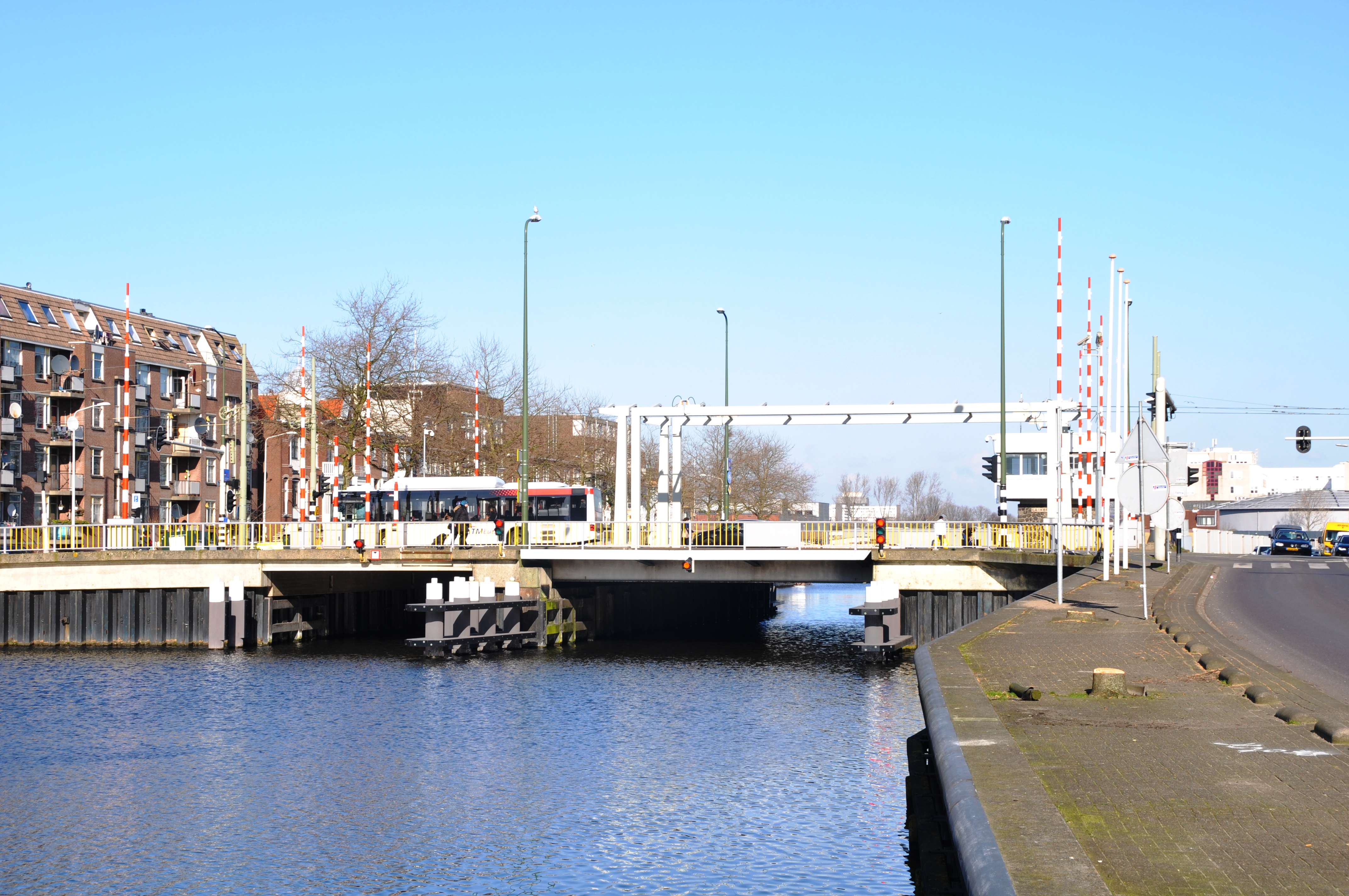 De Laakbrug in de Rijswijkseweg in Den Haag.